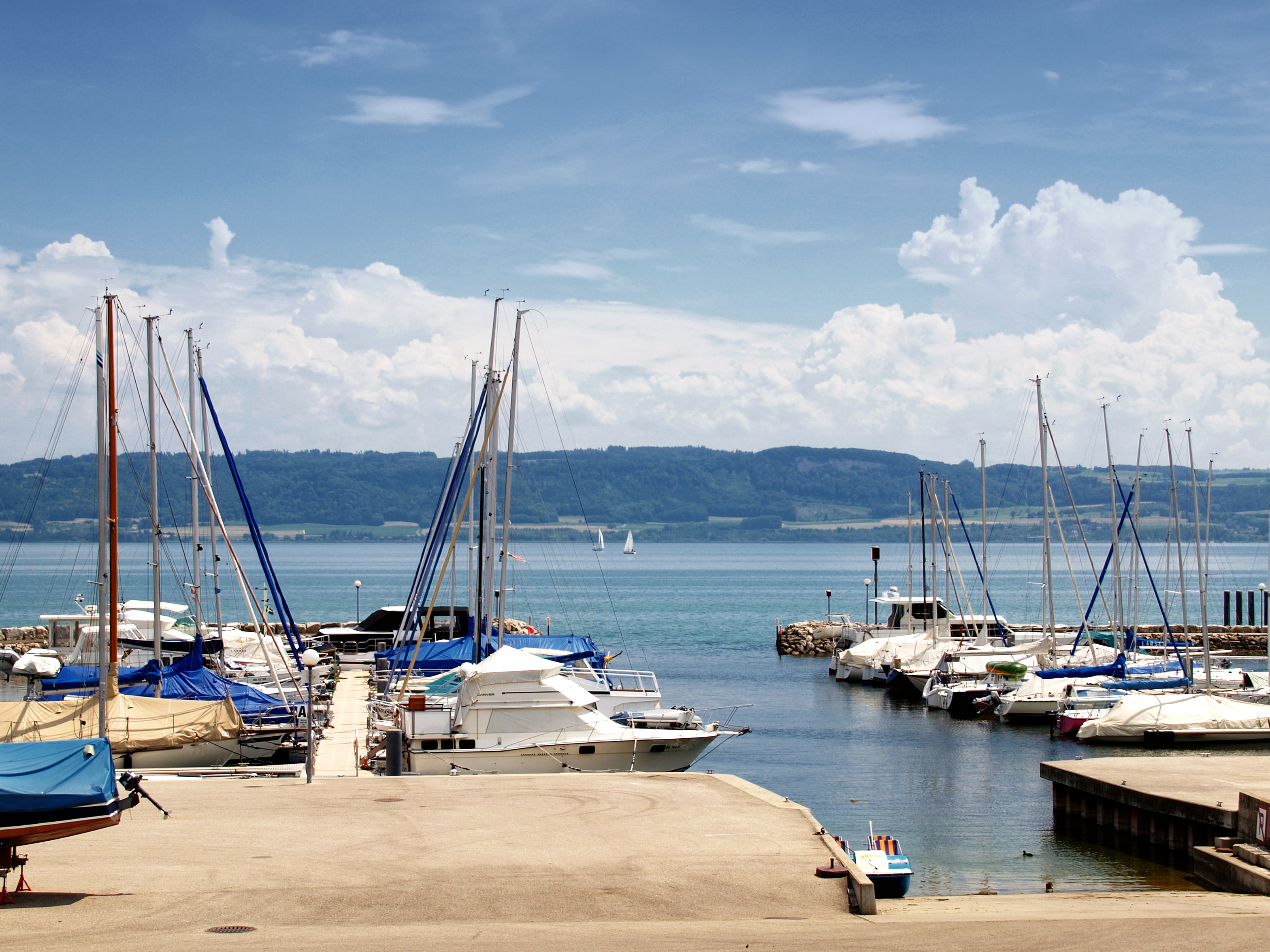 Concise (Suisse) - Vue sur partie de la marina et du lac de Neufchâtel